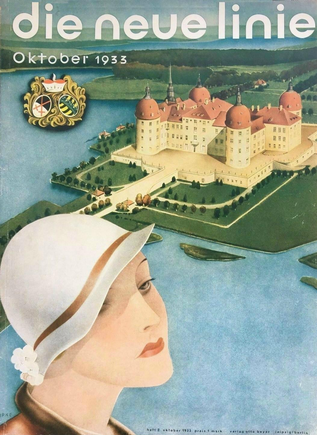 Die neue linie, Oktober 1933. Umschlagzeichnung von Otto Arpke.